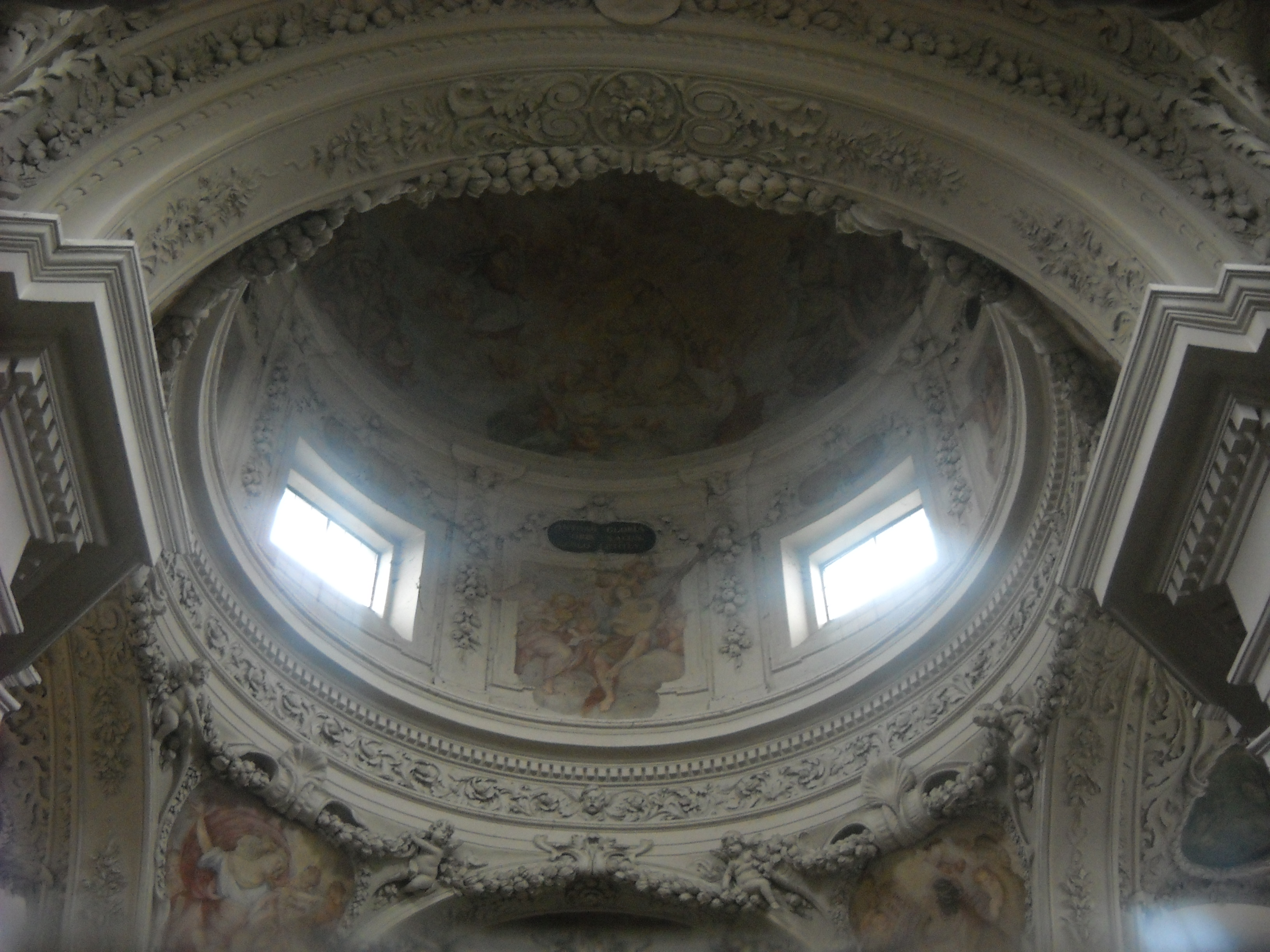 Kościół bernardynów w Warszawie